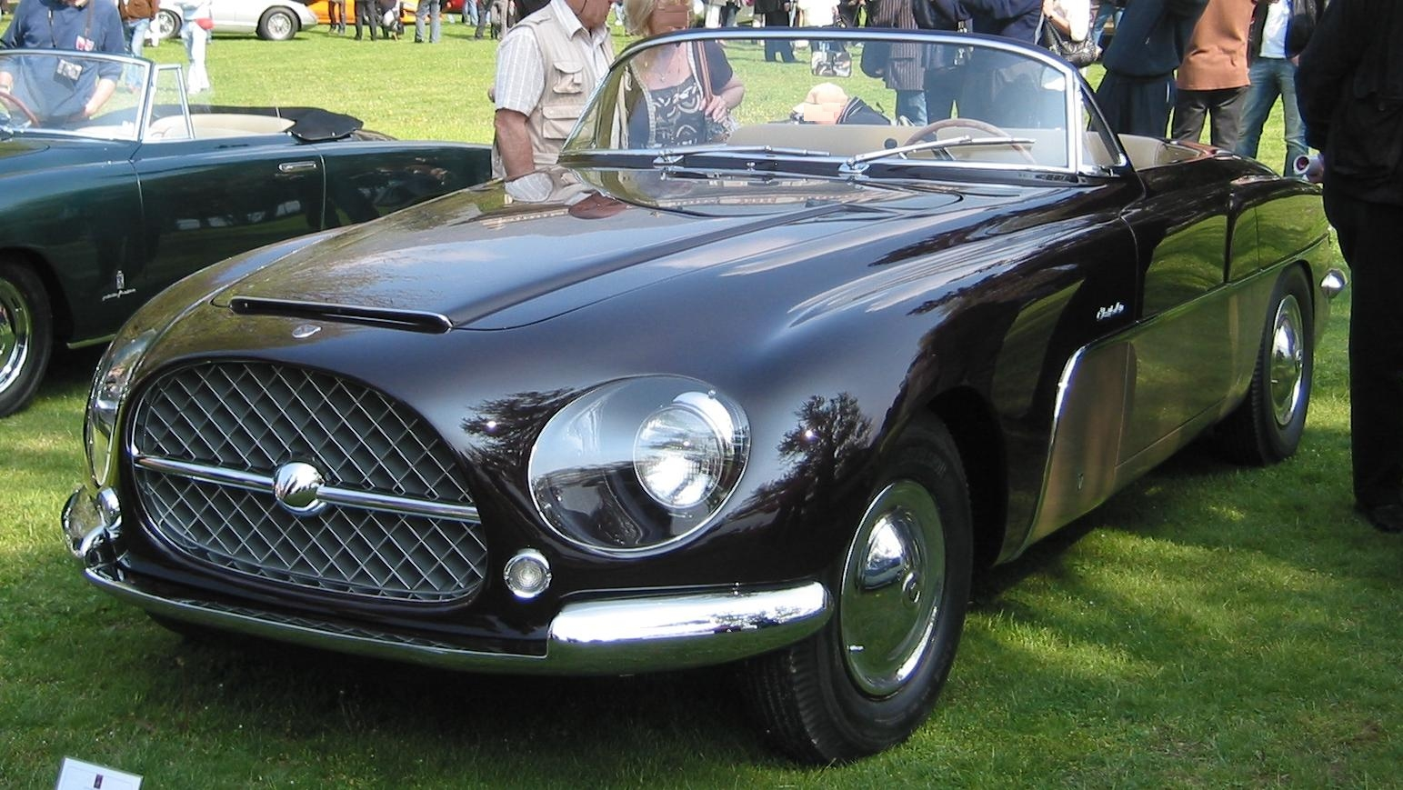 Cisitalia 808 XF 1952